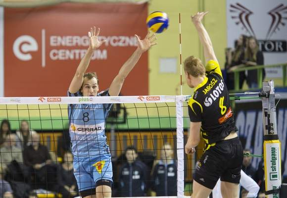 Dirk Westphal - niemiecki siatkarz. 2013/14